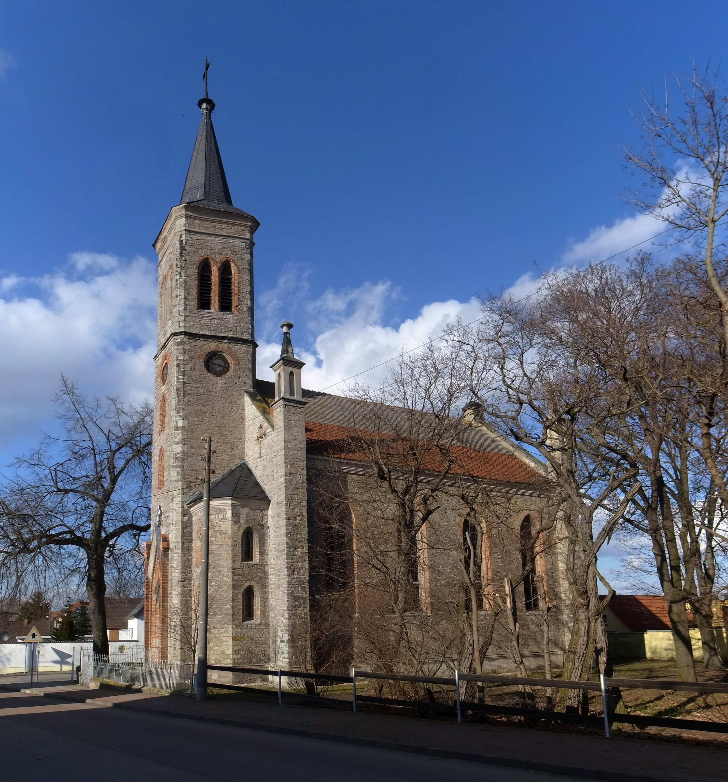 Drosa, evangelische Kirche